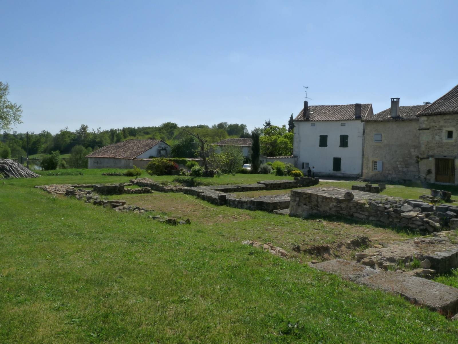 Eglise de Rozet, Combiers, Charente, France